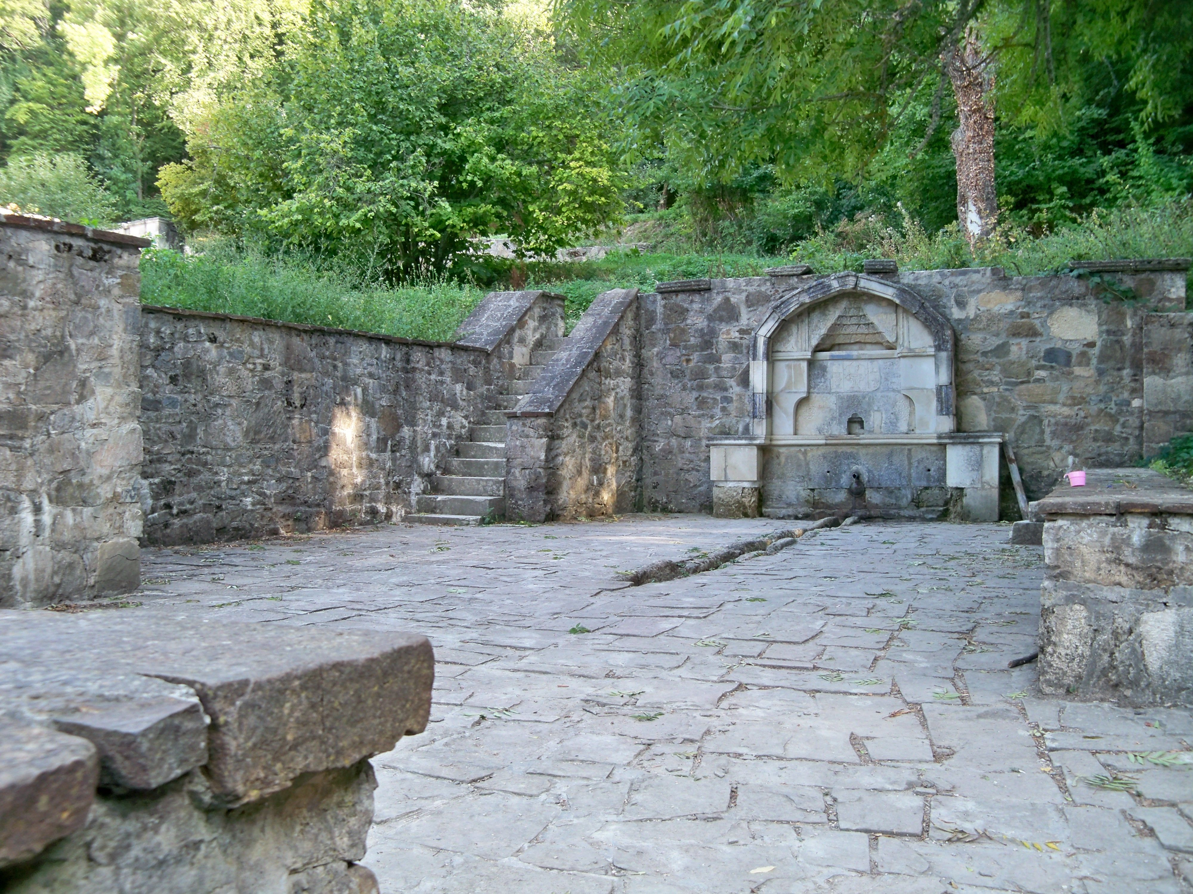 Фонтани, Старий Крим, 3,0 км на південний захід від міста